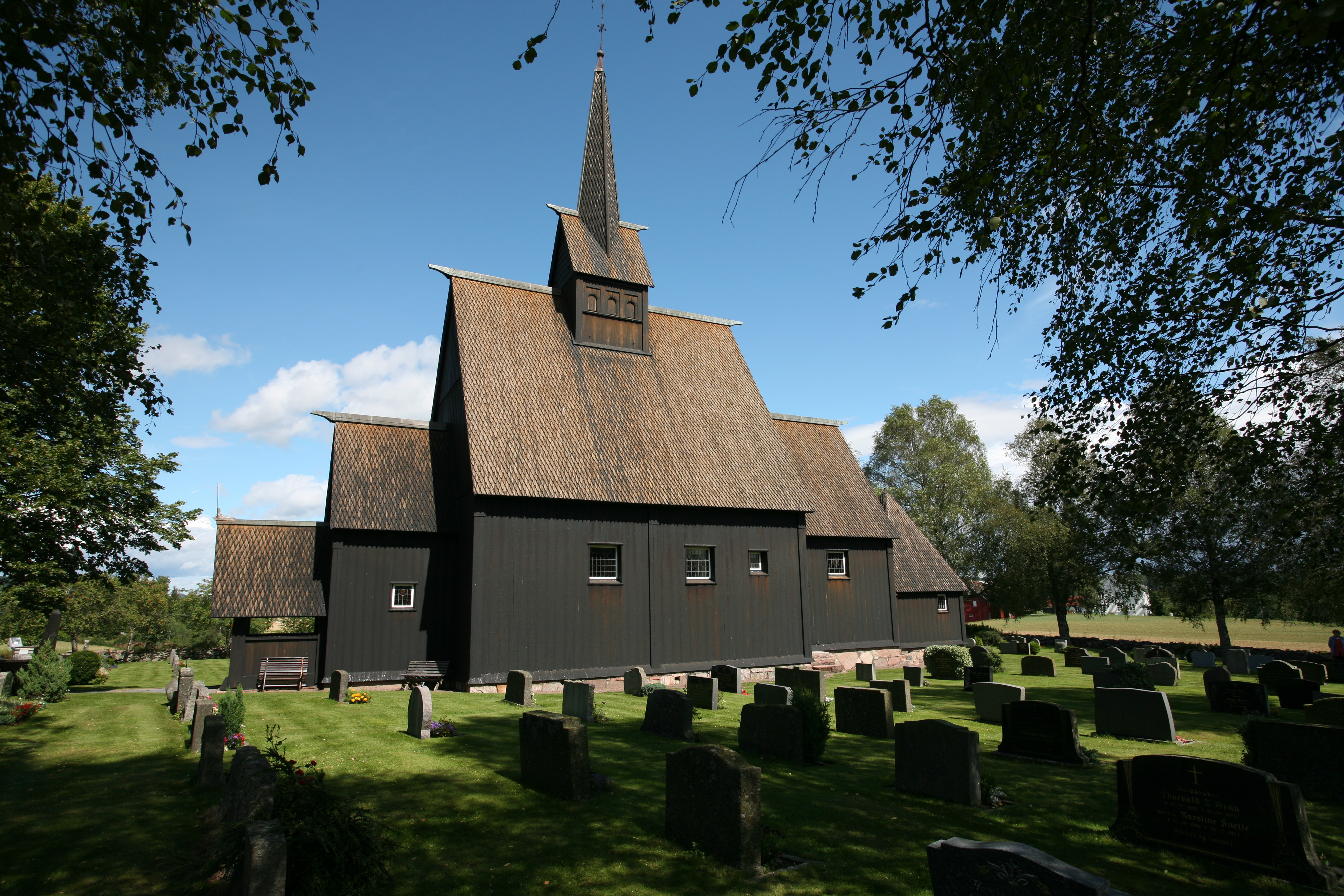 Picture of Høyjord stavkirke (Vestfold - Norway)